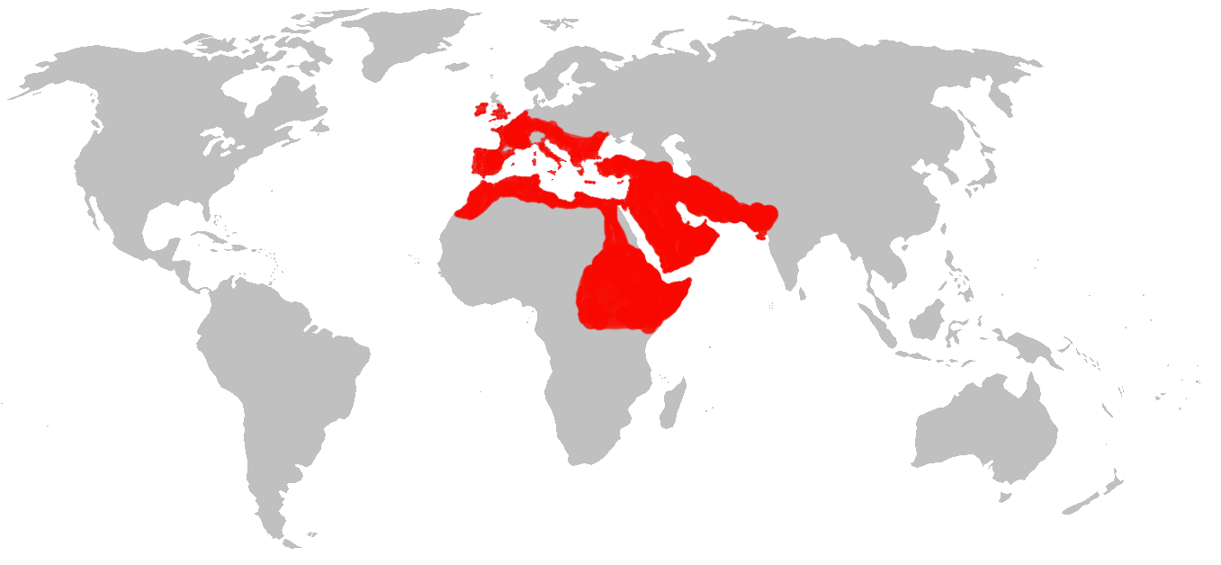 Mapa de distribución de Rhinolophus hipposideros